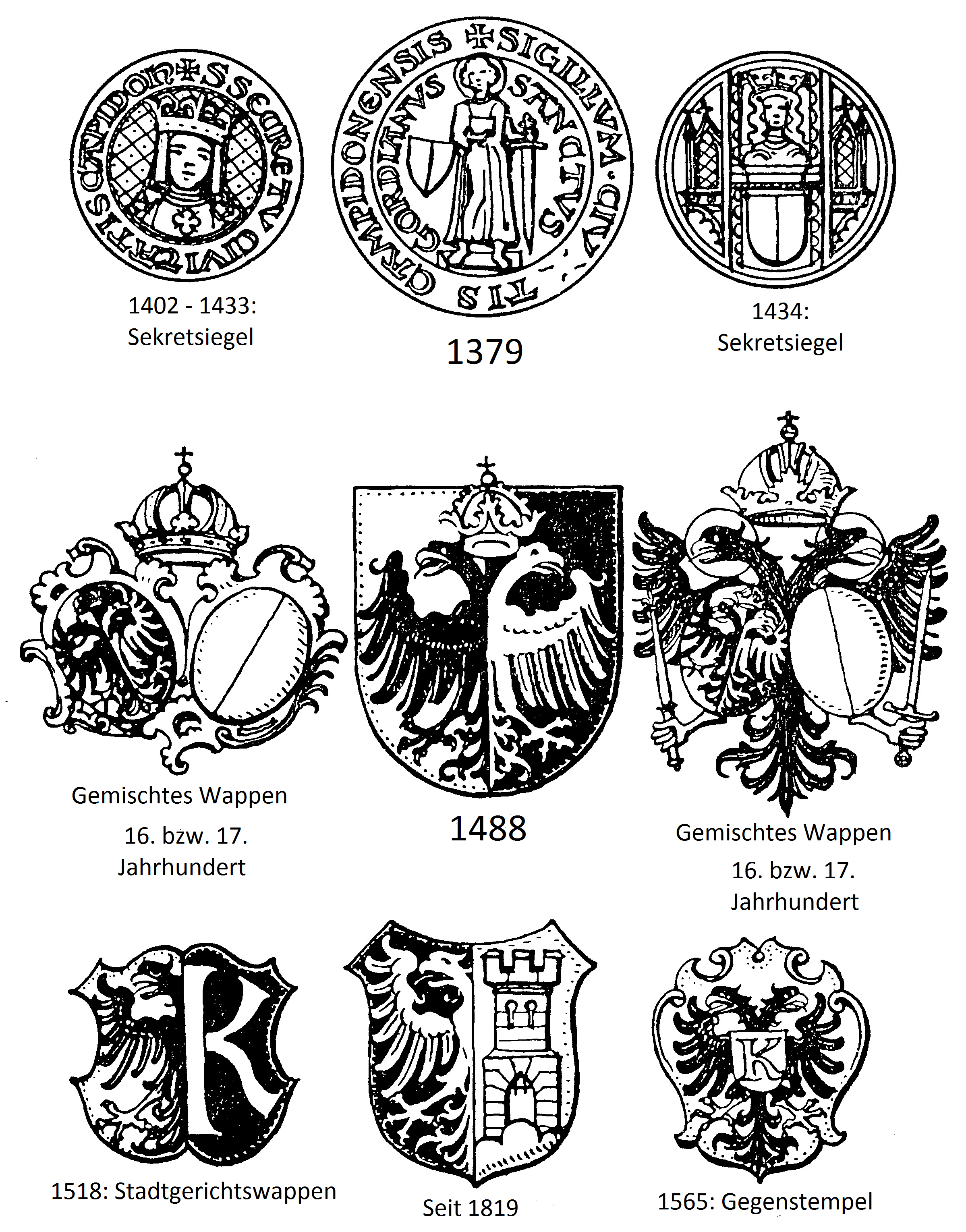 Zusammenstellung der Kempter Wappen, Beschriftung selber erstellt.